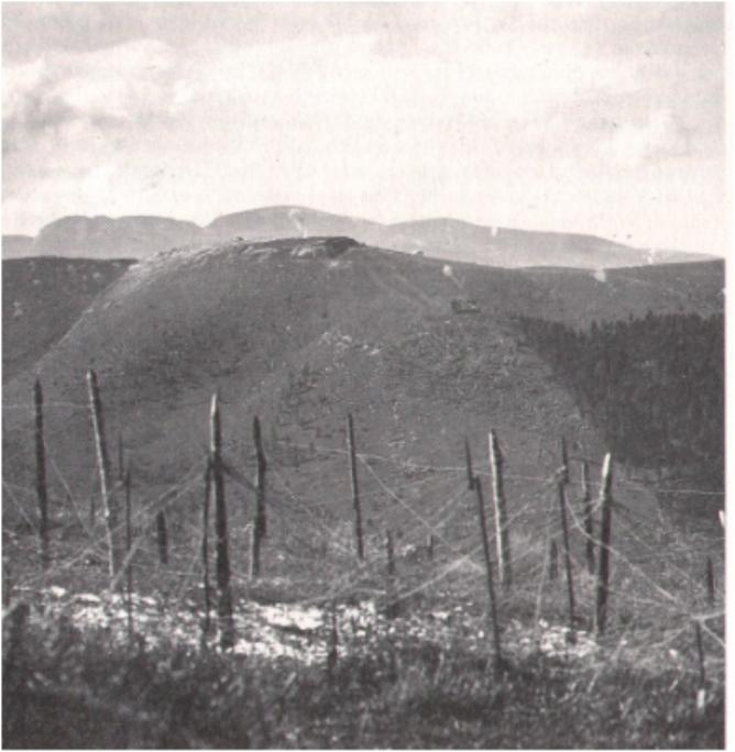 Fort Serrada (Dosso del /sommo) under fire